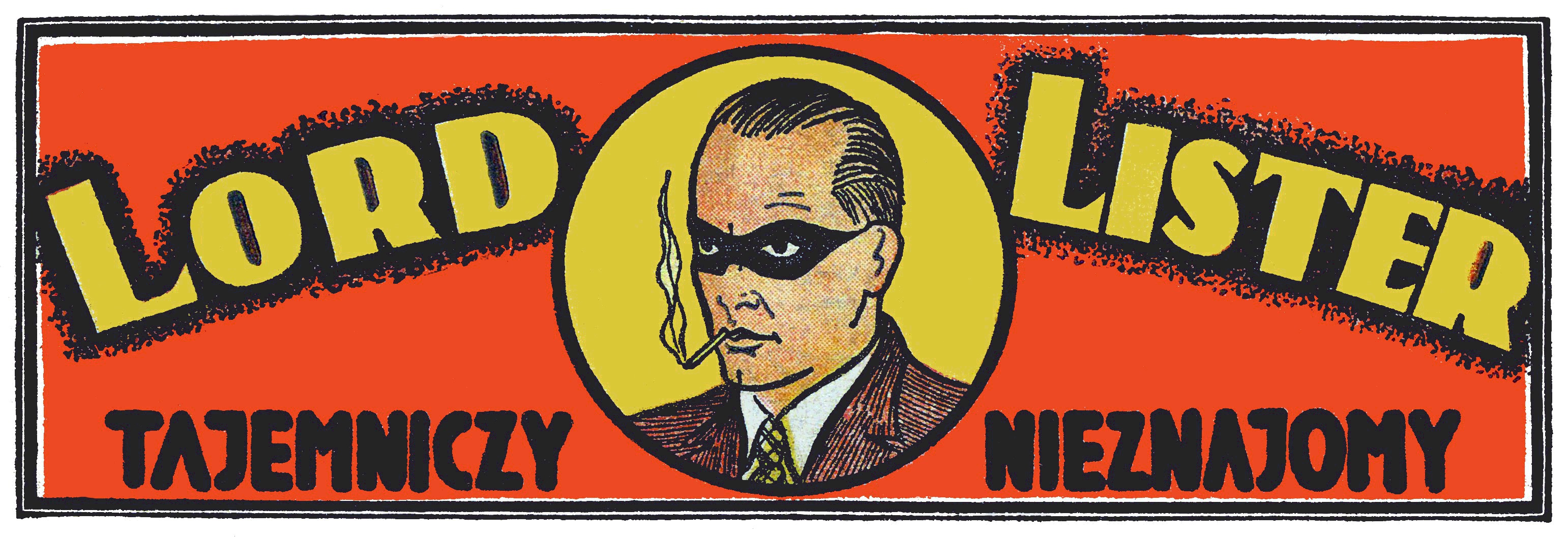 Winieta serii czasopism z serii Lord Lister.